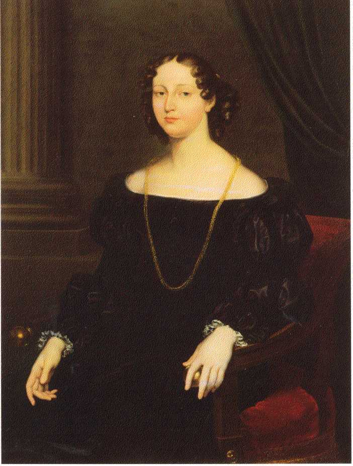 Caroline Amalie von Schleswig-Holstein-Sonderburg-Augustenburg (1796-1881)